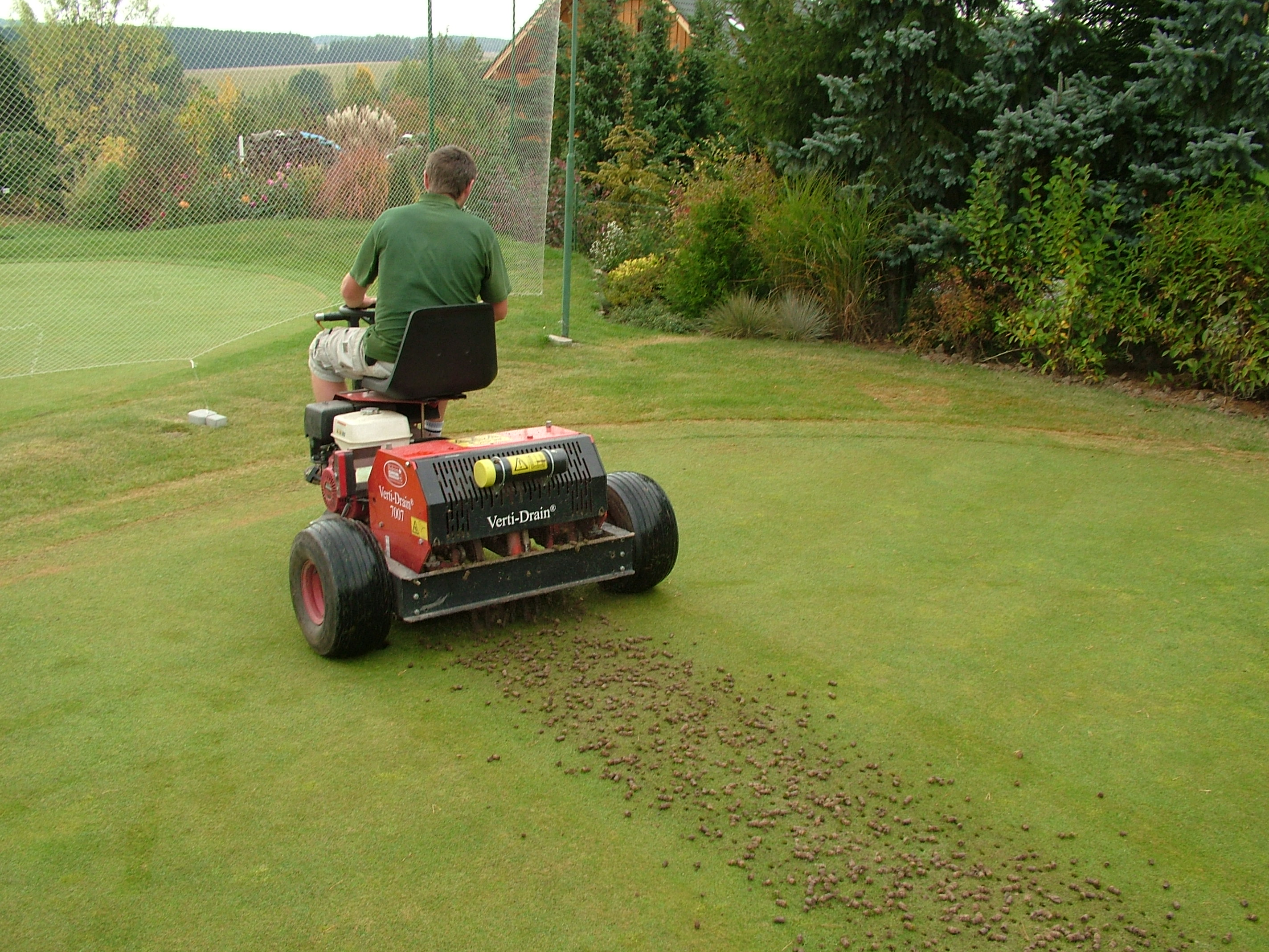 Autor fotografií: Vít Švajcr; Vít Švajcr´s photographs